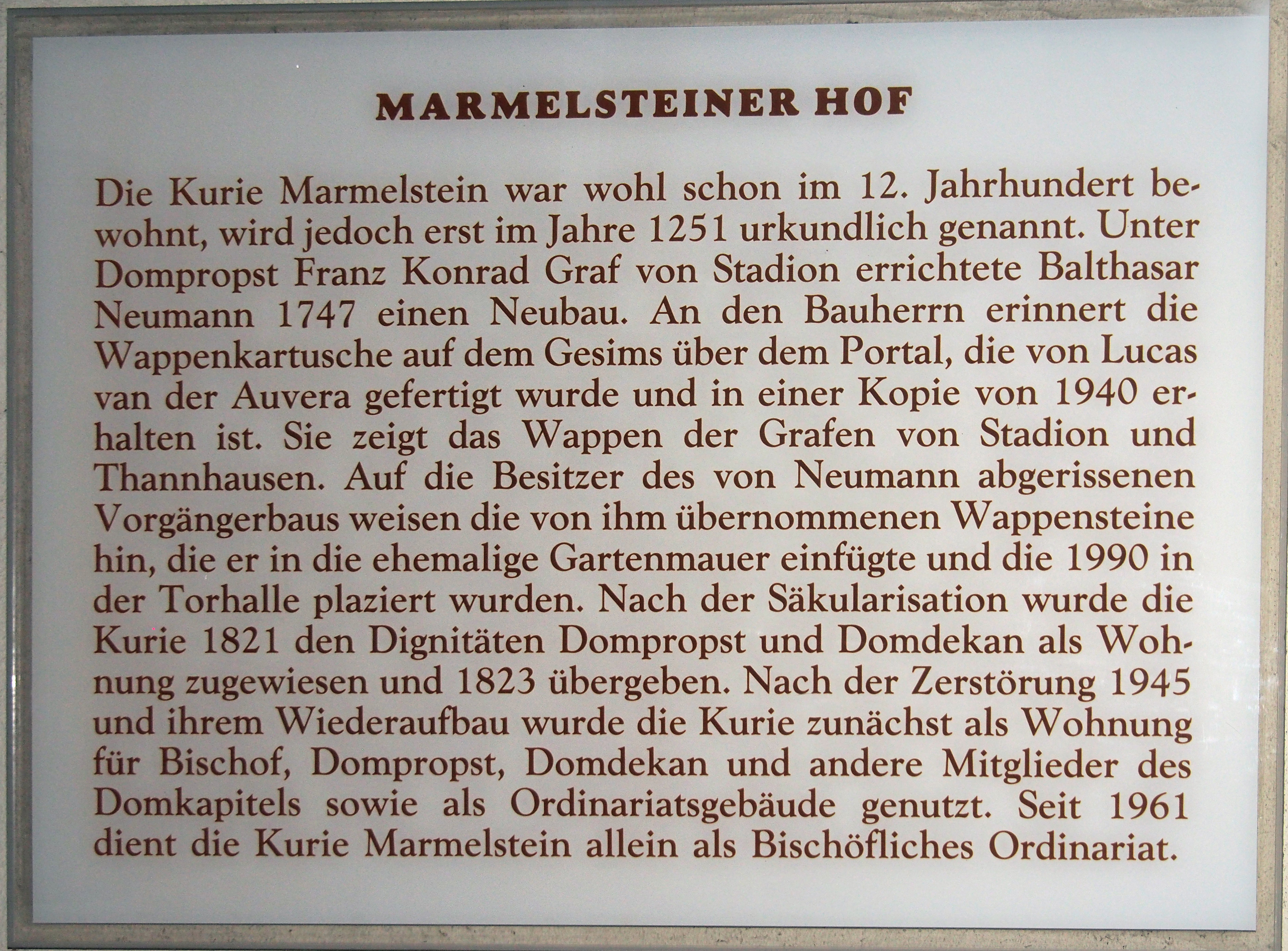 Infotafel am Eingang zum Marmelsteiner Hof